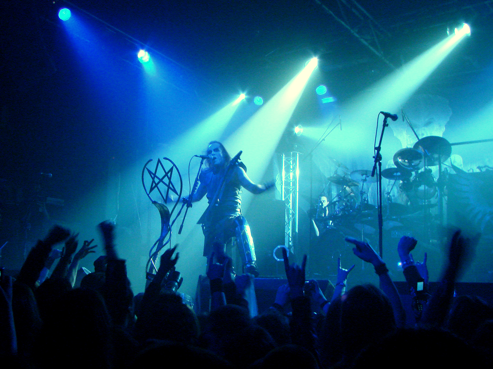 Behemoth en concert à La Locomotive, à Paris, le 17/02/2008: Nergal s'adresse au public.